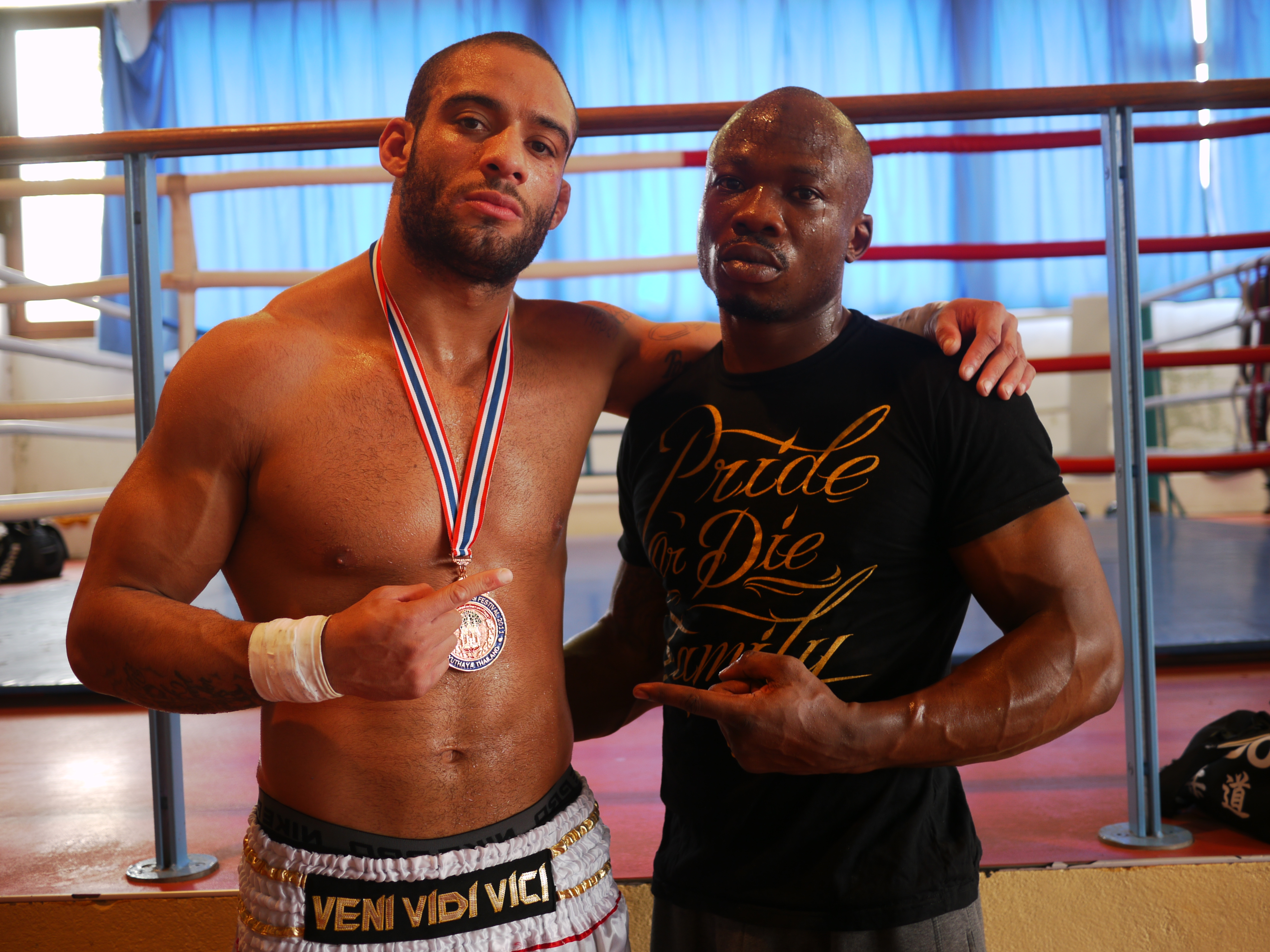 Norman Paraisy et son coach Achille